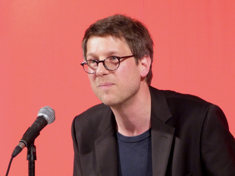 German poet Jan Wagner, at the Erlanger Poetenfest 2014.